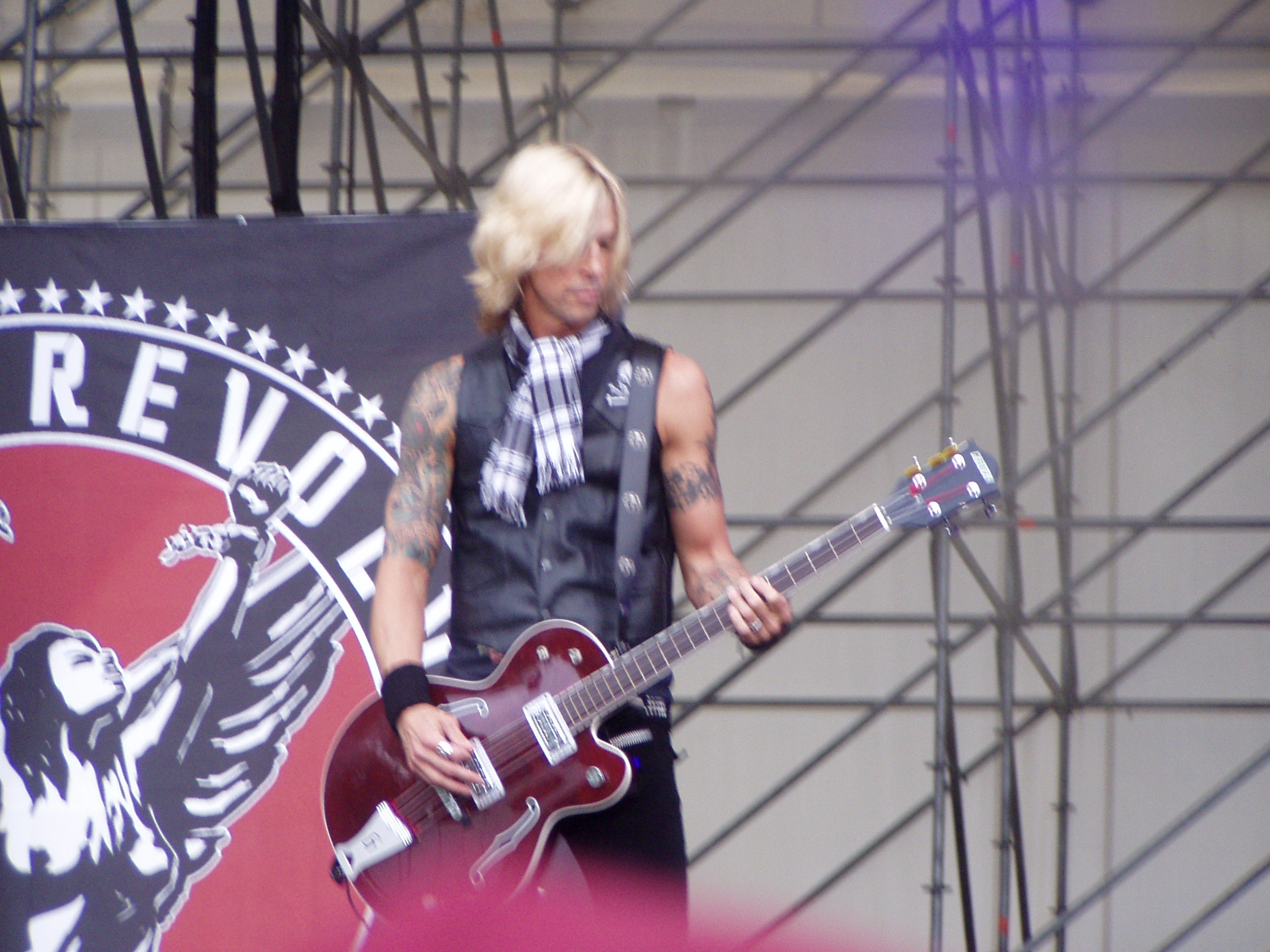 I Velvet Revolver al Gods of Metal 2007